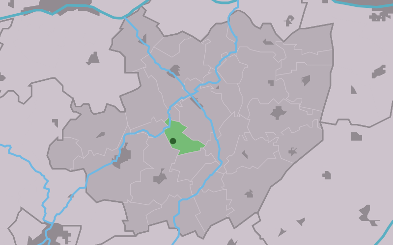 Kaartsje fan himrik fan Hinnaard